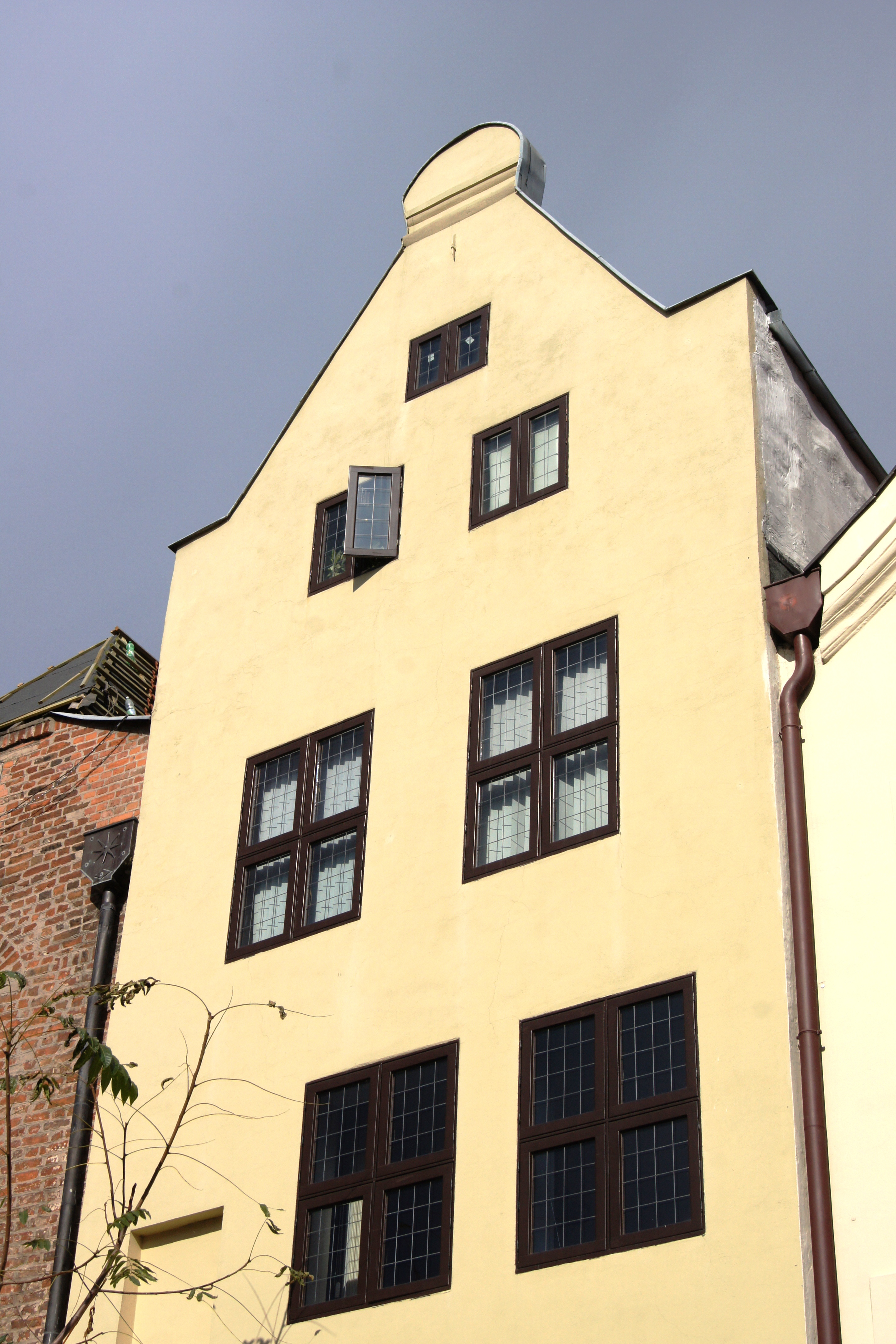 Toruń, ul. Kopernika 19 - kamienica, XV, XVIII, 1966, obecnie siedziba IG PAN (zabytek nr A/529)